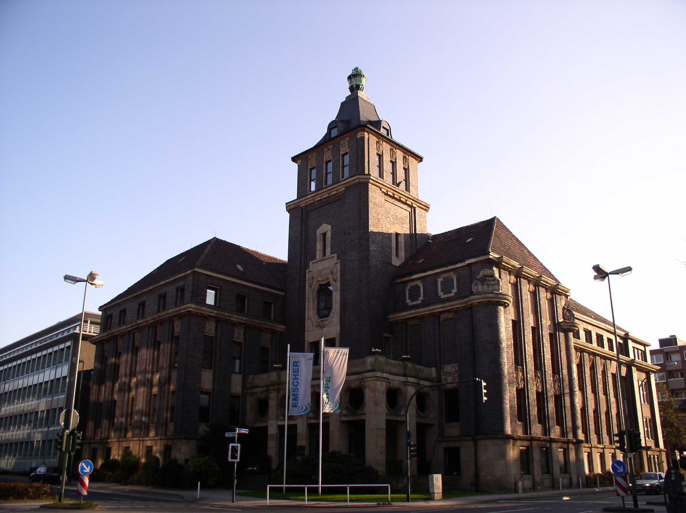 Description: Sitz der Emschergenossenschaft in Essen Source: photo taken by me, April 2005 Photographer: Baikonur